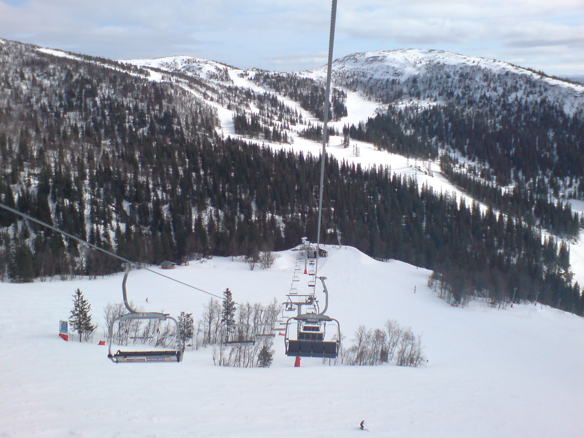 Hummelliften in Åre